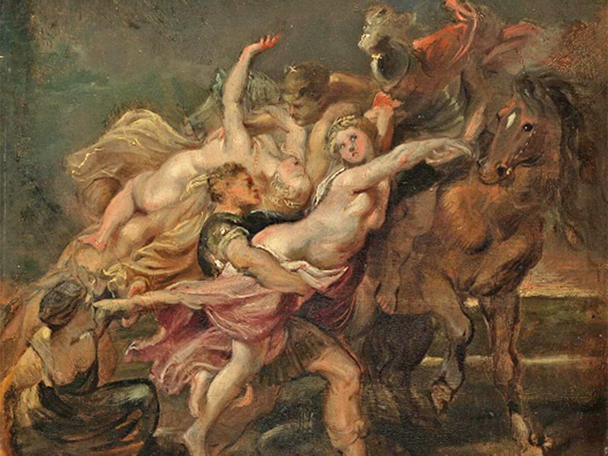 Ratto delle Leucippidi - Oslo, Nasjonalmuseet. Olio su tela, cm. 27 x 29